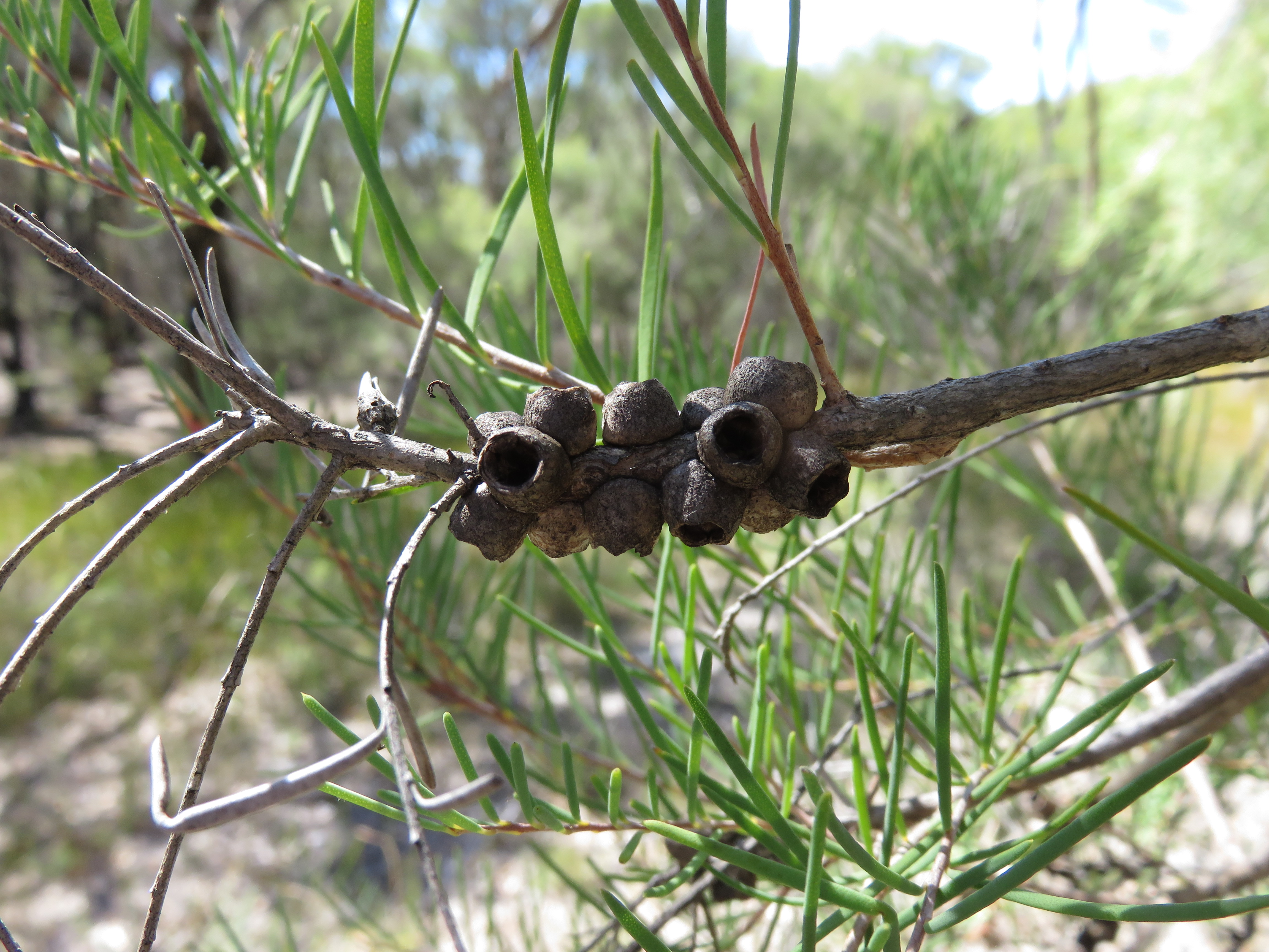 Melaleuca rhaphiophylla (Swamp paperbark), Tone-Perup Nature Reserve, April 2015.